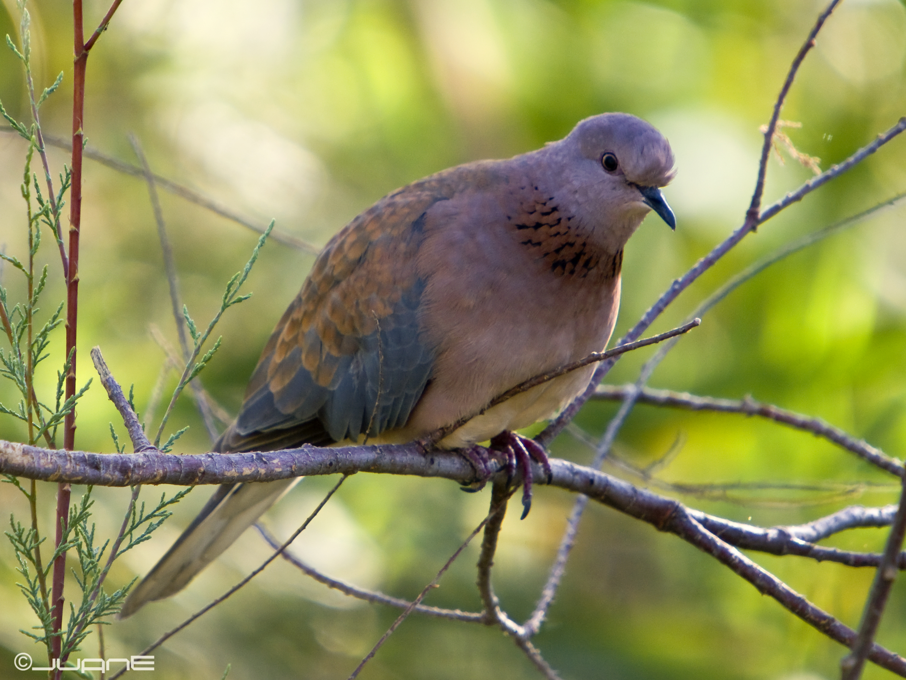 Tórtola Senegalesa ( Streptopelia senegalensis )